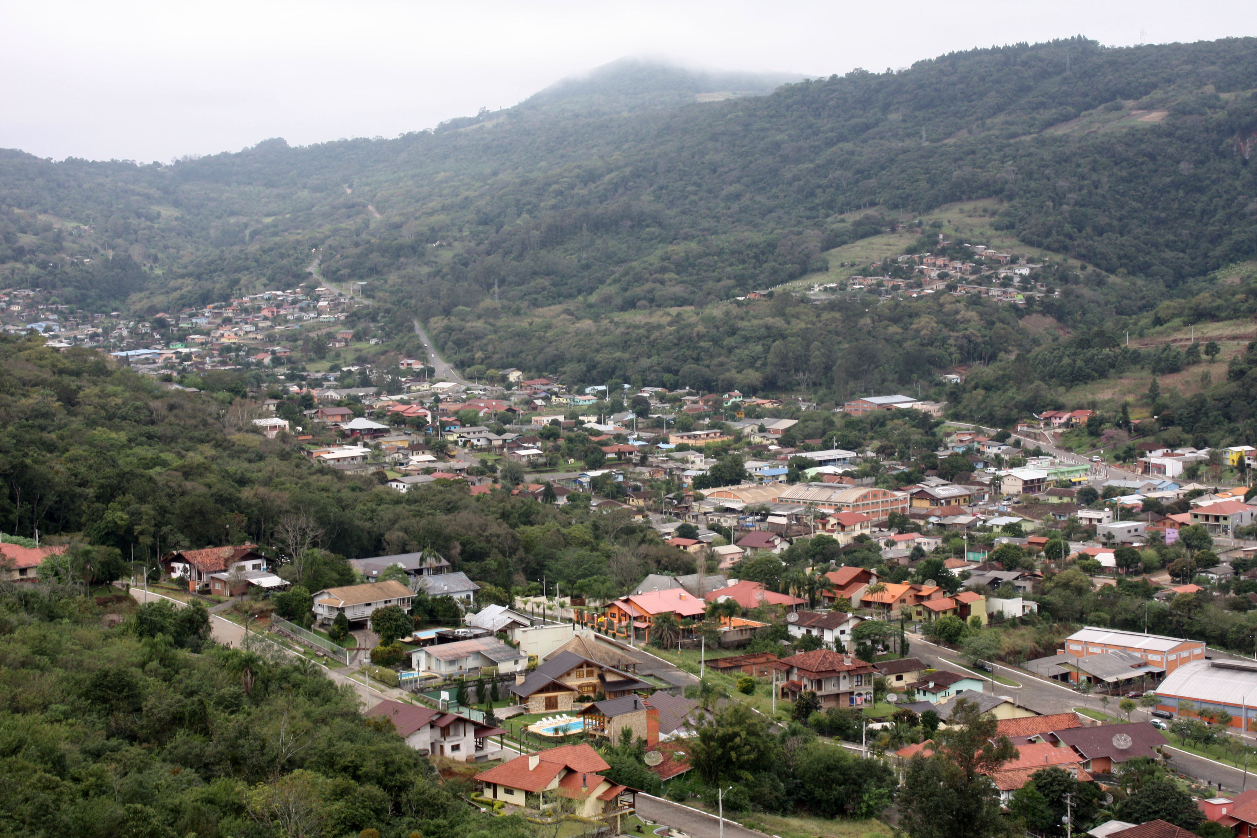 Bairro Viaduto em Igrejinha, Rio Grande do Sul.